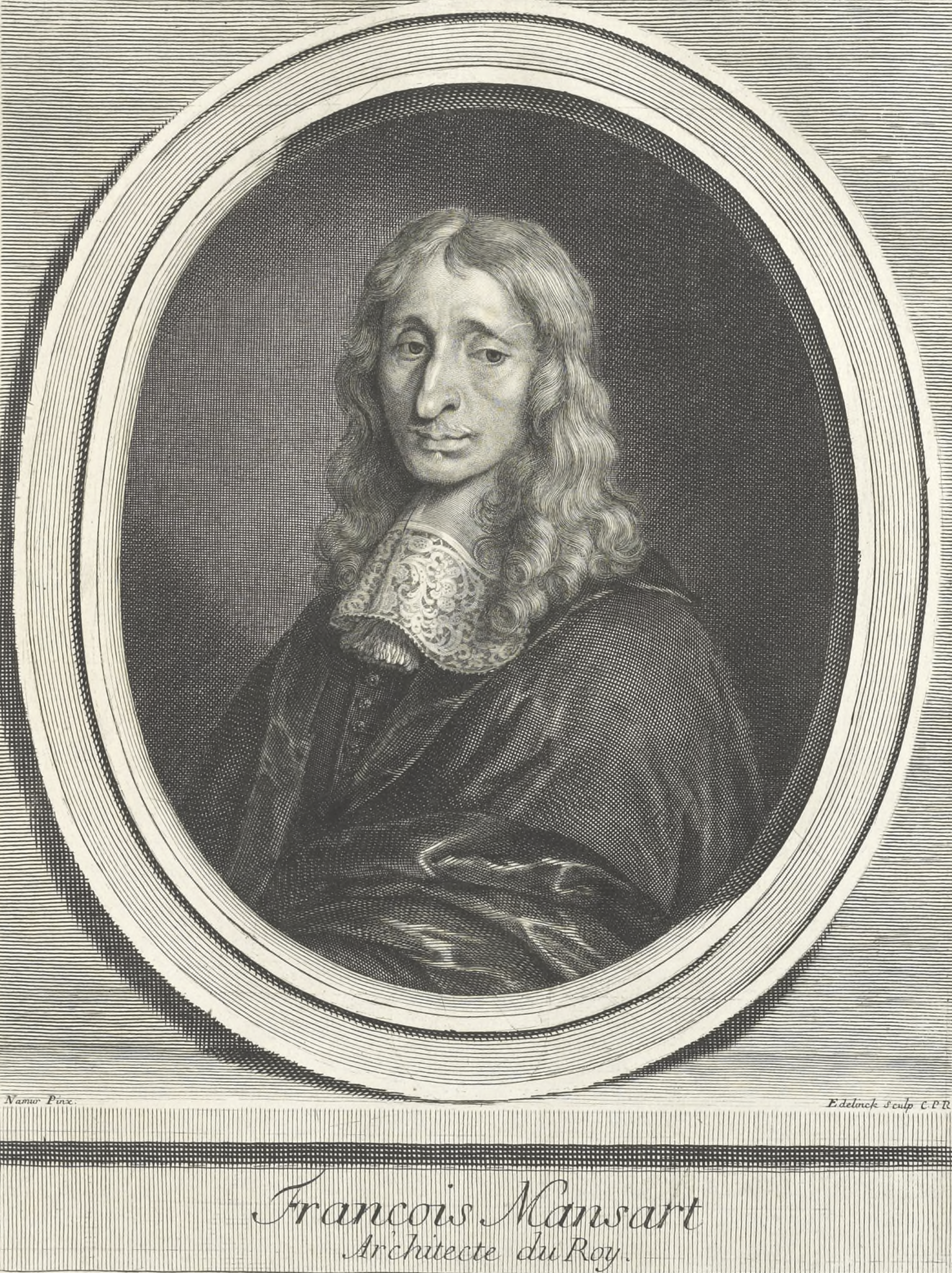 François Mansart (gravure par Edelinck d'après un portrait peint par Louis de Nameur - brûlé en 1720-)